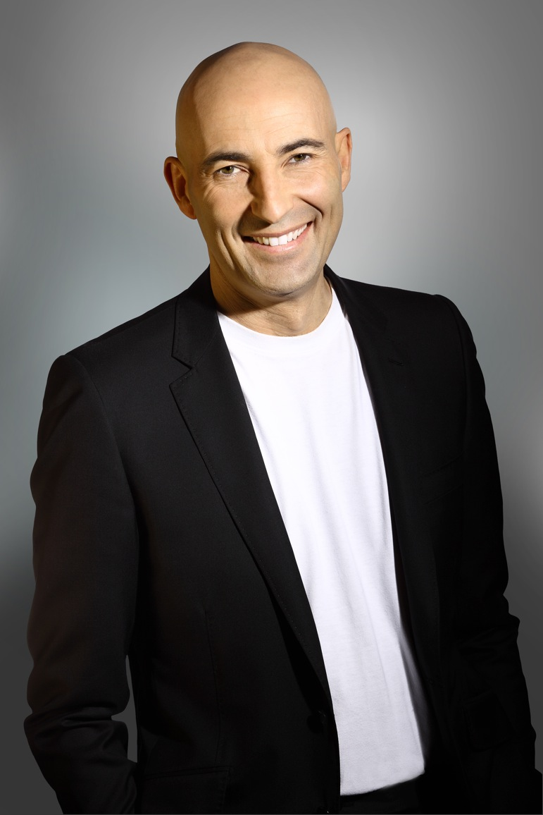 Portrait de Nicolas Canteloup